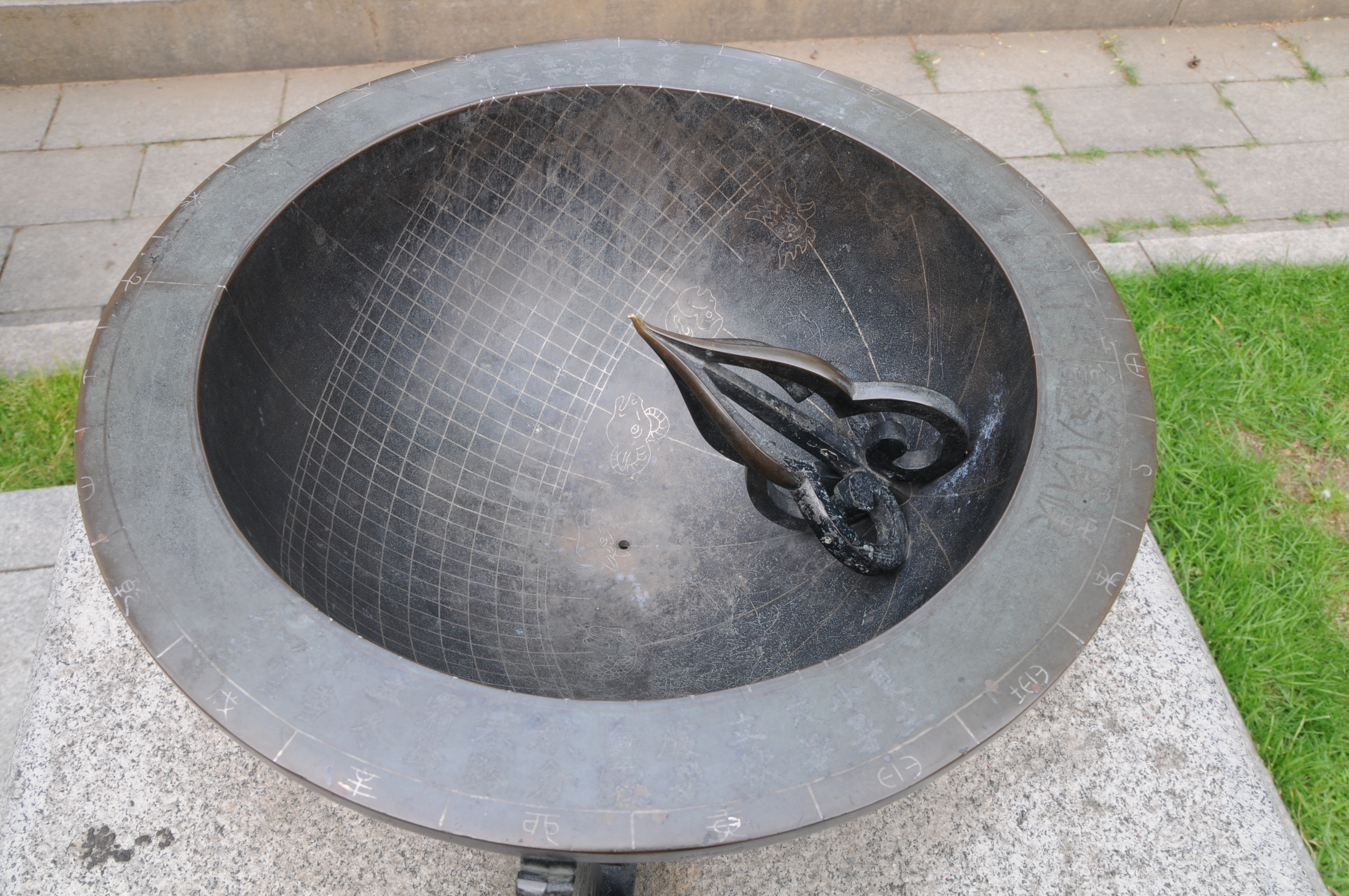 서울특별시 종로구 훈정동 산 65번지 5호에 소재한 앙부일구